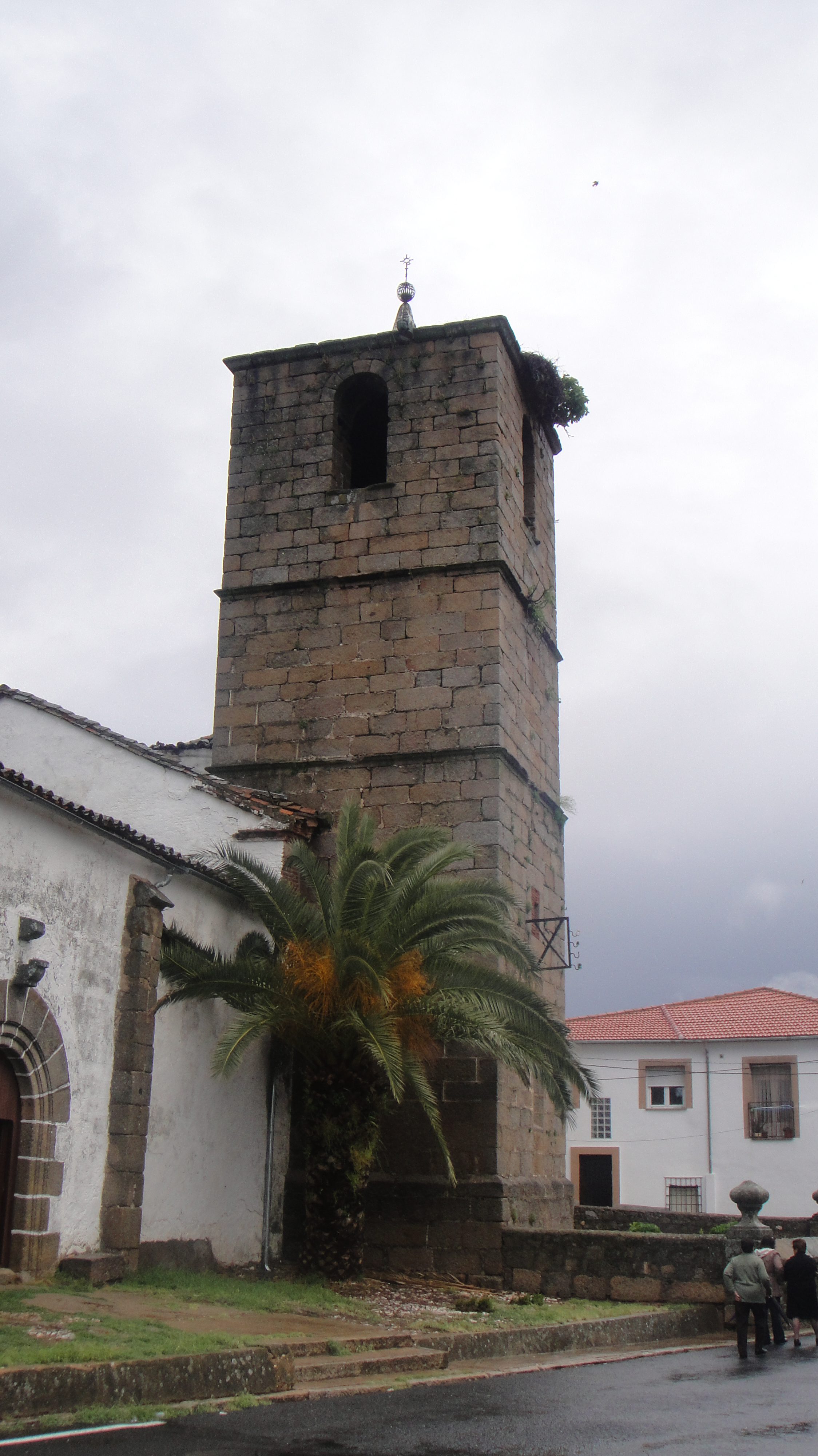 Campanario de la iglesia de Guijo de Galisteo (provincia de Cáceres, España)